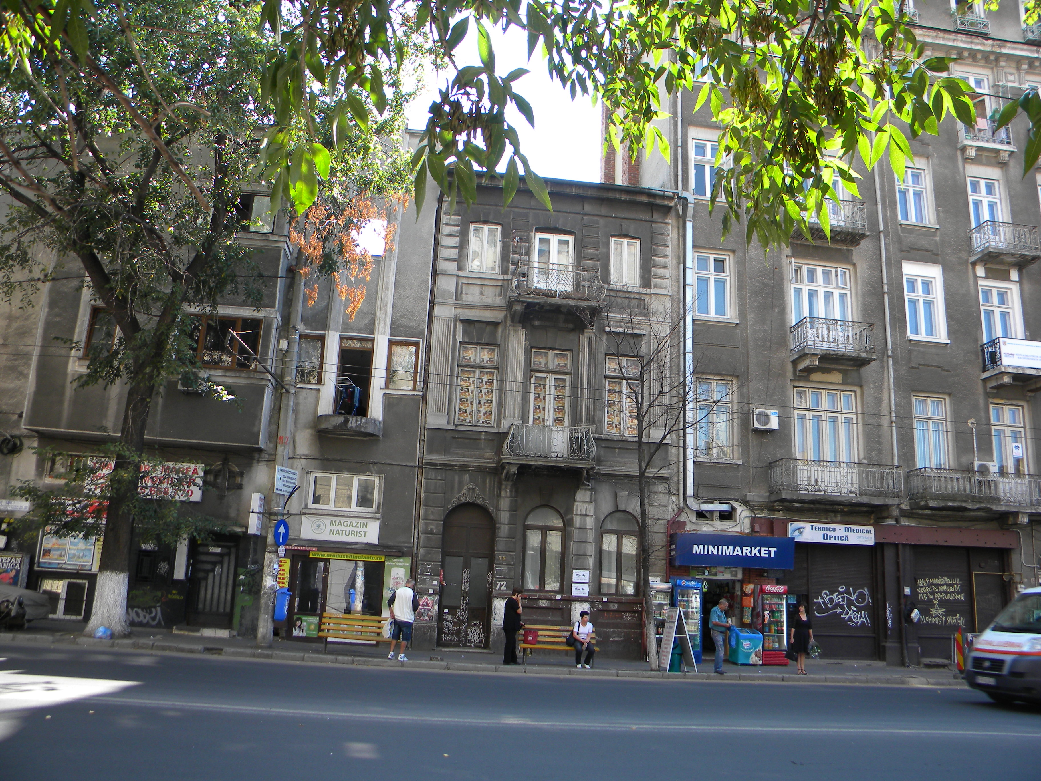 Imobil pe Bd. Carol I nr. 72, Bucuresti sect.2